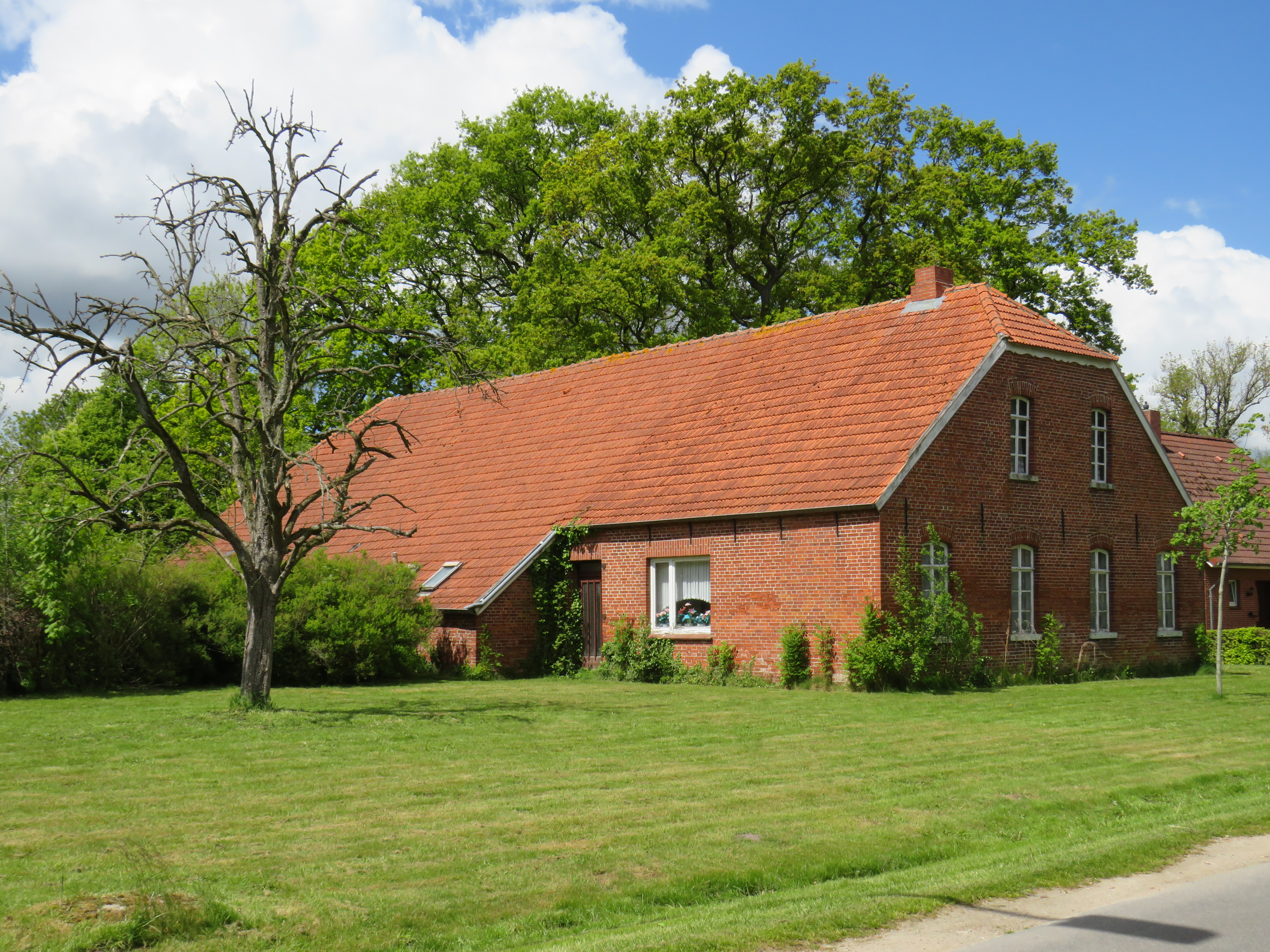 Gulfhaus Hesel Kiefelder Straße 11